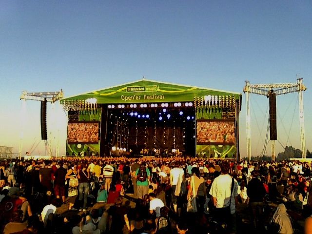 Open'er Festival 2009 (Gdynia, 2-5.07.2009) Main Stage